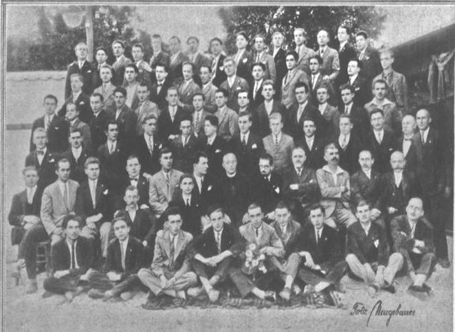 Učesnici kongresa Hrvatske pravaške omladine, 2. rujna 1928. godine u Zagrebu.